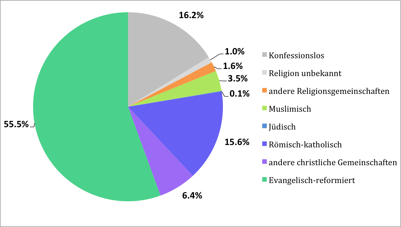 Religionszugehörigkeit im Kanton Bern (Stand: 31.12.2012)